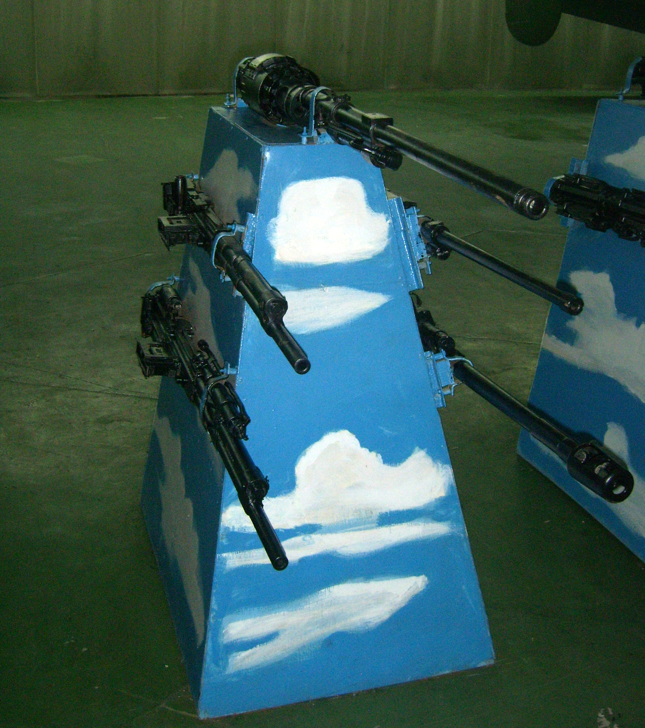 航空机关炮，摄于北京航空博物馆